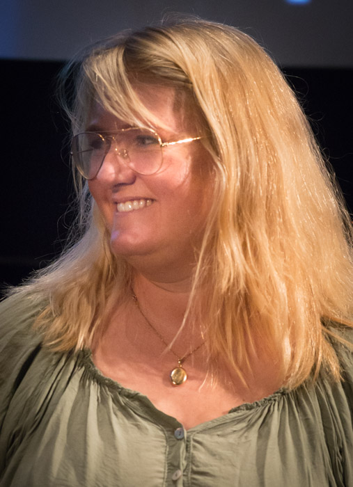 Johanna Bergenstråhle under presentationen av den Svenska filmhösten i Filmhuset i Stockholm den 17 augusti 2015.